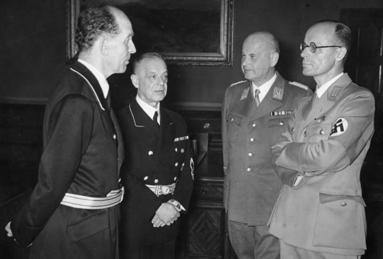 Berlin, Amtsübernahme Dr. Thierack Scherl Der neue Reichsjustizminister übernahm sein Ministerium Im Rahmen einer kurzen Feierstunde übernahm am Mittwochmittag der neue Reichsminister der Justiz, Professor Dr. Thierack, die Geschäfte des Reichsjustizministeriums. Unser Bild von der Feier zeigt (von links nach rechts) den neuen Präsidenten des Volksgerichtshofes Dr. Freisler, Staatssekretär Dr. Schlegelberger, der bisher die Geschäfte des Reichsjustizministers führte, Reichsjustizminister Professor Dr. Thierack und den neuen Staatssekretär im Reichsjustizministerium Dr. Rothenberger. Scherl-Bilderdienst, Berlin 26.8.42 II. Text ADN-Zentralbild-Archiv Im faschistischen Deutschland Reichsjustizminister Dr. Otto G. Thierack trat sein neues Amt an. Bei einer Feier zur Amtsübernahme v.l.n.r.: der neue Präsident des Volksgerichtshofes Dr. Roland Freisler, Staatssekretär Schlegelberger, der bisher die Geschäfte des Reichsjustizministeriums führte, Reichsjustizminister Dr. Otto G. Thierack und der neue Staatssekretär im Reichsjustizministerium Dr. Rothenberger. Abgebildete Personen: from left to right: Freisler, Roland Dr.: Präsident des Volksgerichtshofes, Deutschland Schlegelberger, Franz Prof. Dr.: Staatssekretär Reichsjustizministerium, Juristenprozeß Nürnberg, Bundesrepublik Deutschland (GND 118958275) Thierack, Otto Georg Dr.: Reichsminister der Justiz, Präsident des Volksgerichtshofes, Deutschland Rothenberger, Curt Dr.: Staatssekretär im Justizministerium, Oberlandesgerichtspräsident Hamburg, Deutschland